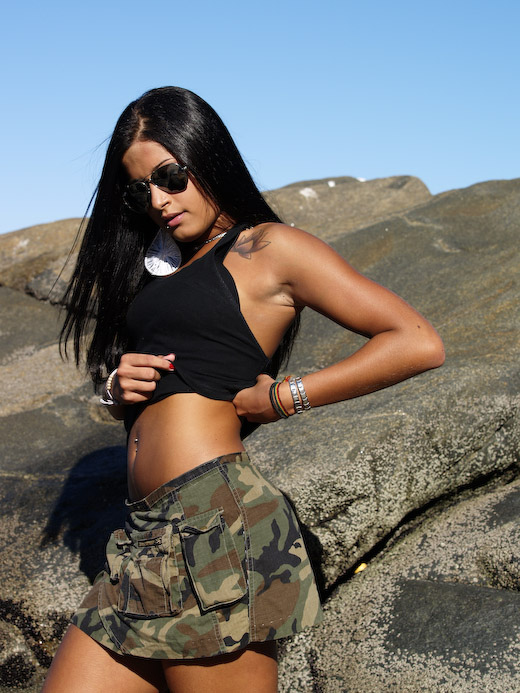 Modelo: Aline Campos Makeup: Luciene Rosas Ensaio para o apenas começando.